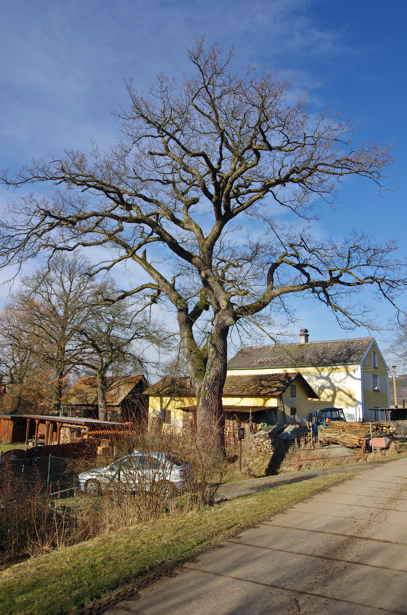 památný strom Dub v Malé Šitboři, okres Cheb